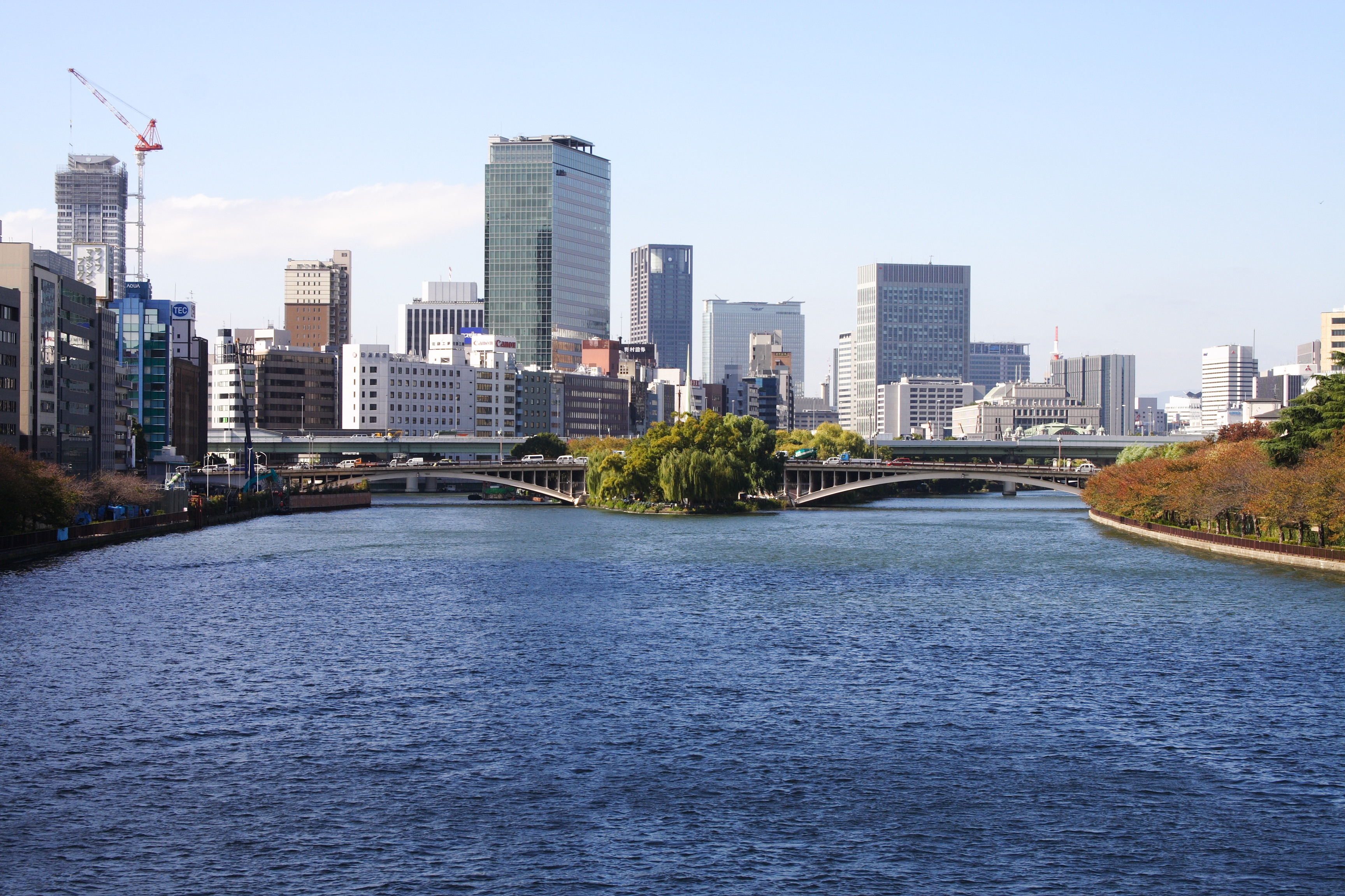 天神橋(大阪市, Japan)